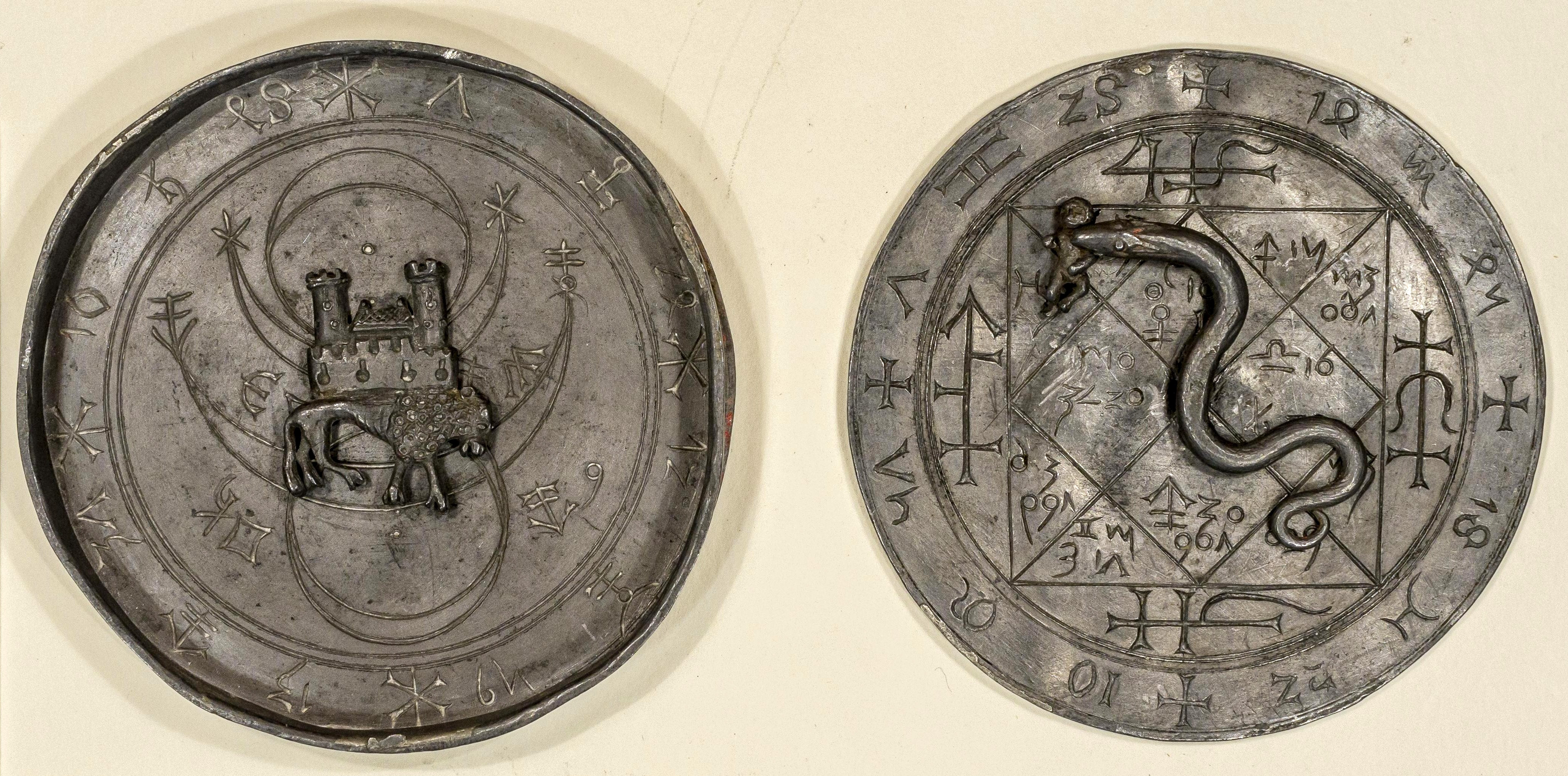 Das Bauamulett des Basler Hofs in Freiburg. Es befindet sich heute im Museum für Stadtgeschichte Freiburg mit der Inventarnummer: H 51/010. Durchmesser ca. 80mm, Höhe 11mm Es ist eine handtellergroße runde Bleidose bestehend aus Boden und Deckel, beide sind mit astrologischen Gravuren verziert und es gehören kleine plastische Figuren dazu. Es sind 3 Figuren: Ein Löwe, eine Schlange und ein Kind. Alle 3 Teile haben einen kleinen Pin auf der Rückseite, im Boden der Dose und dem Deckel ist jeweils eine entsprechende Bohrung. Es wird angenommen dass es sich um ein Horoskop handelt. Die Bleikapsel wurde 1950 unversehrt neben dem Hauptportal in den Trümmern des 1944 zerstörten Hauses gefunden. Es ist auch nicht bekannt ob das Objekt aus einem der Vorgängerbauten stammt oder für den Bau des großen Stadthauses durch Konrad Stürzel von Buchheim zwischen 1480 und 1500 hergestellt wurde. Die Schlange und der Löwe passen in beide Bohrungen, so dass zwei Konfigurationen möglich sind, die ursprüngliche Konfiguration ist nicht bekannt, es ist auch nicht bekannt ob die Figuren ursprünglich fest oder beweglich angebracht waren. Variante 1: Löwe auf dem Dosenboden und Schlange mit Kind auf dem Deckel = ursprüngliche Anordnung. Variante 2: Schlange mit Kind auf dem Dosenboden und Löwe auf dem Deckel. Hier Variante 1. In der ursprünglichen Anordnung, war der Kopf der Schlange anders als hier abgebildet unten. Die Bilder kamen zustande mit der freundlichen Unterstützung des Museum für Stadtgeschichte.